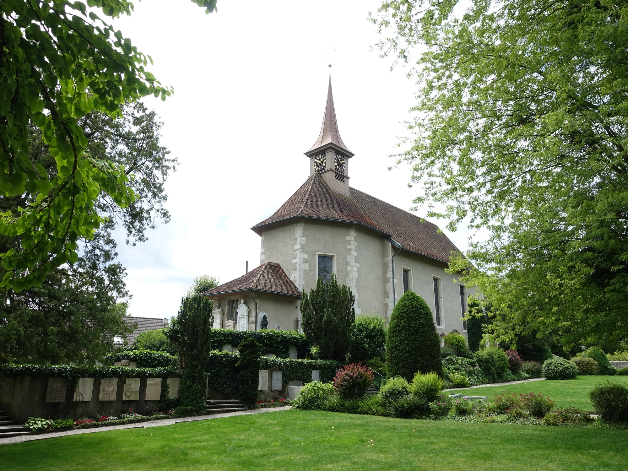 Katholische Kirche St. Niklaus. Feldbrunnen-St. Niklaus, Solothurn, Schweiz.